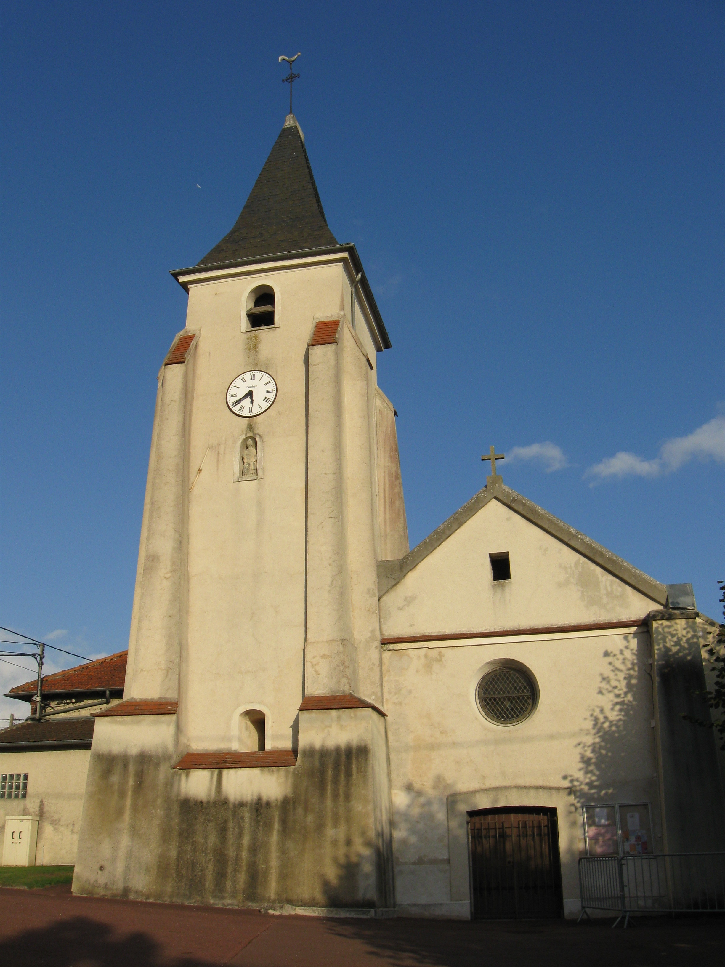 Église Saint-Pierre de Cuisy. (Seine-et-Marne, région Île-de-France).